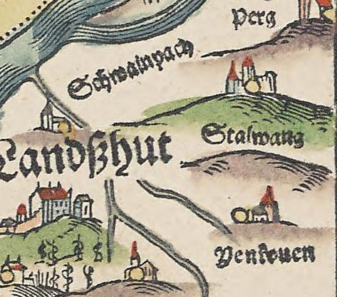 Ausschnitt aus Tafel 14 der Bairischen Landtafeln von Philipp Apian (1568)